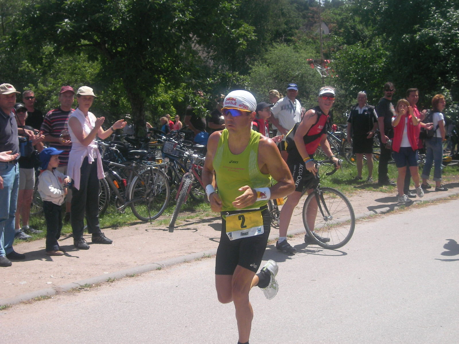 Thomas Hellriegel (2), Quelle Challenge Roth 2007